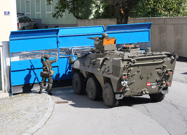 (c) - Crowd and Riot Control - Schild für den Radpanzer Pandur A1. Mehr Bilder von der European Advance 2010 hier: EURAD 2010